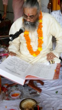 संस्कृतम्: गतवर्षे रामनवम्यां रामचरितमानसं पठन् रामानुजेयः देवनाथ-महोदयः। जम्मूनगरे राष्ट्रियसंस्कृतसंस्थाने ।